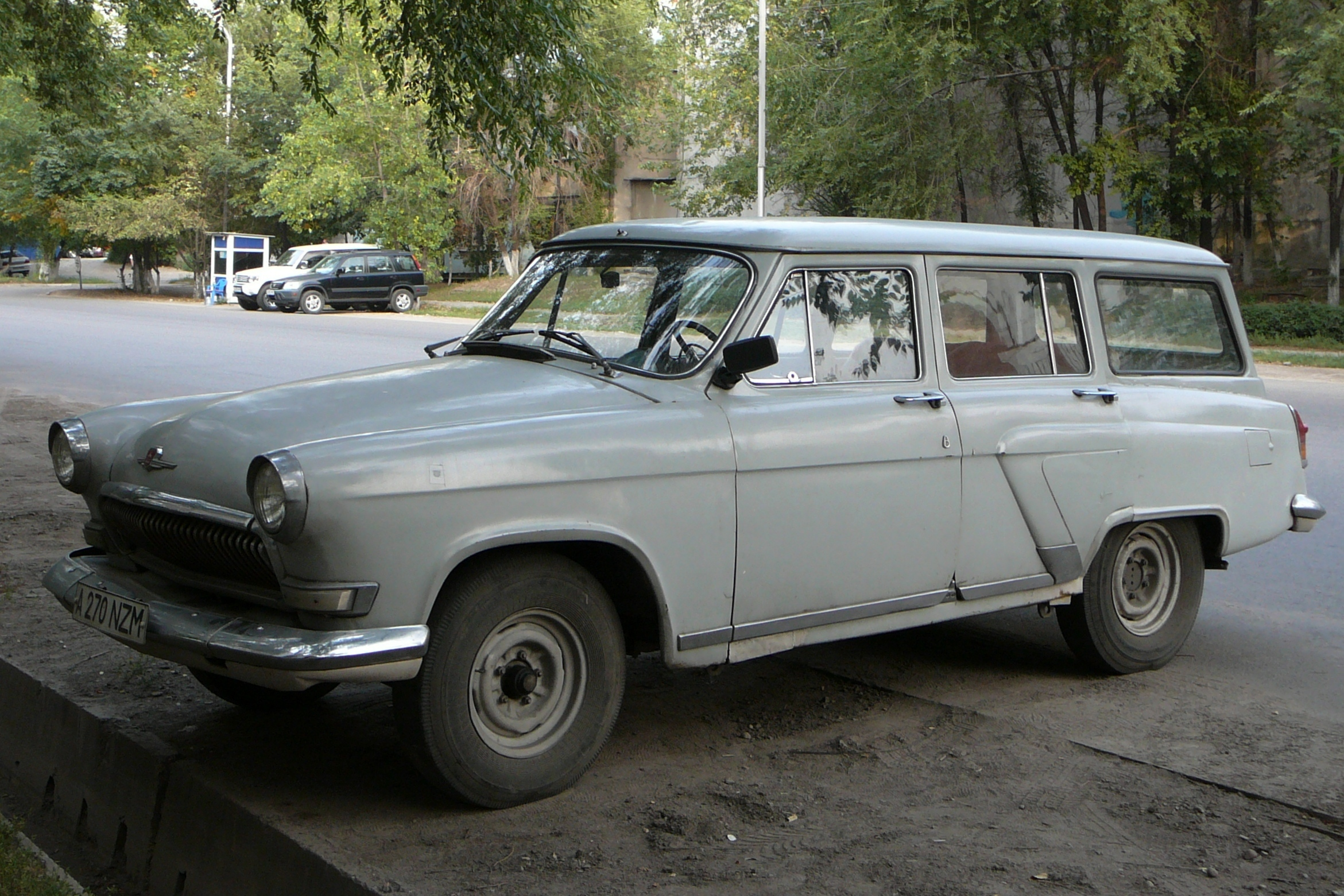 Газ-22 вид сбоку. Алма-Ата